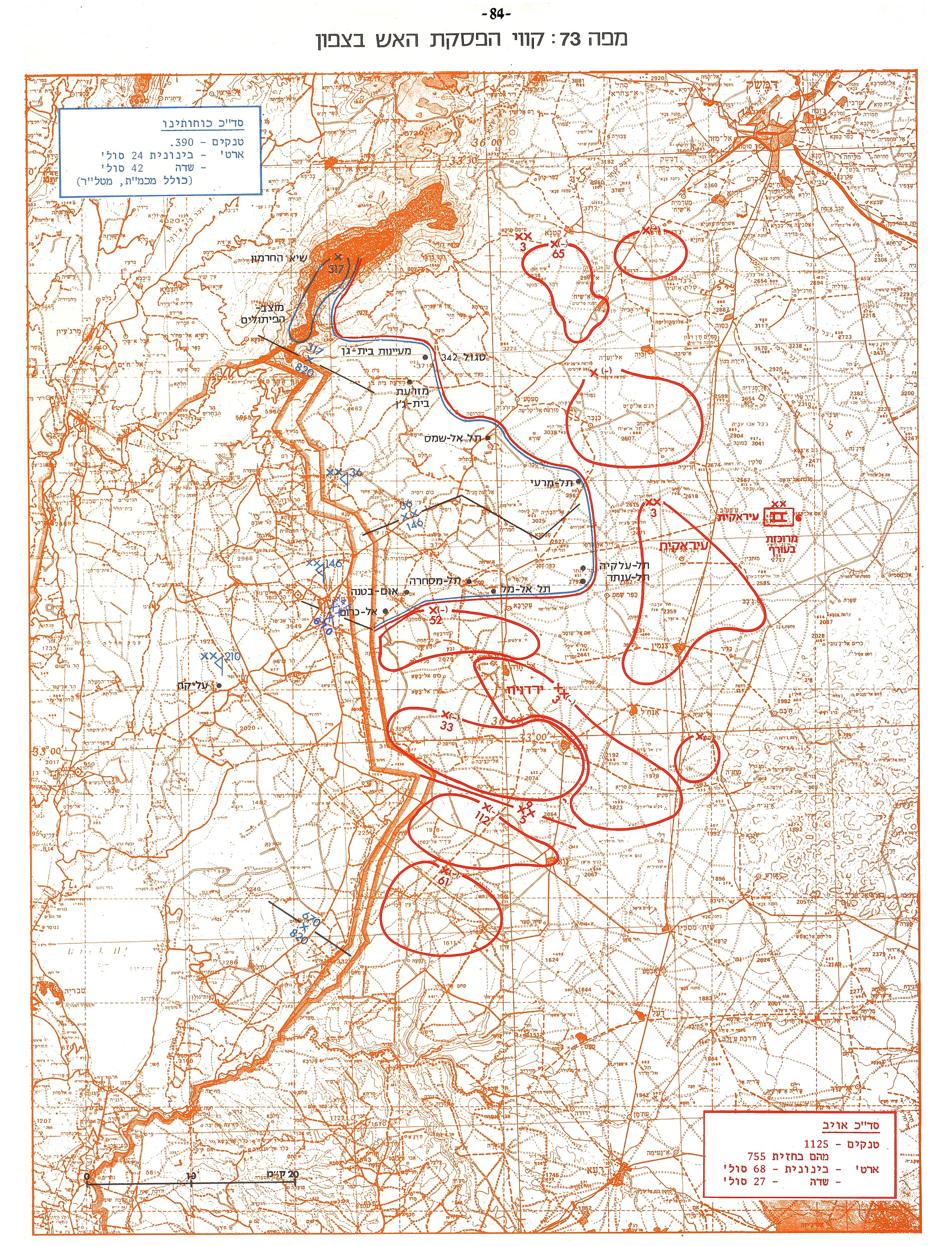 מפה 73 - קווי ההפסקת אש בצפון - מלחמת יום הכיפורים